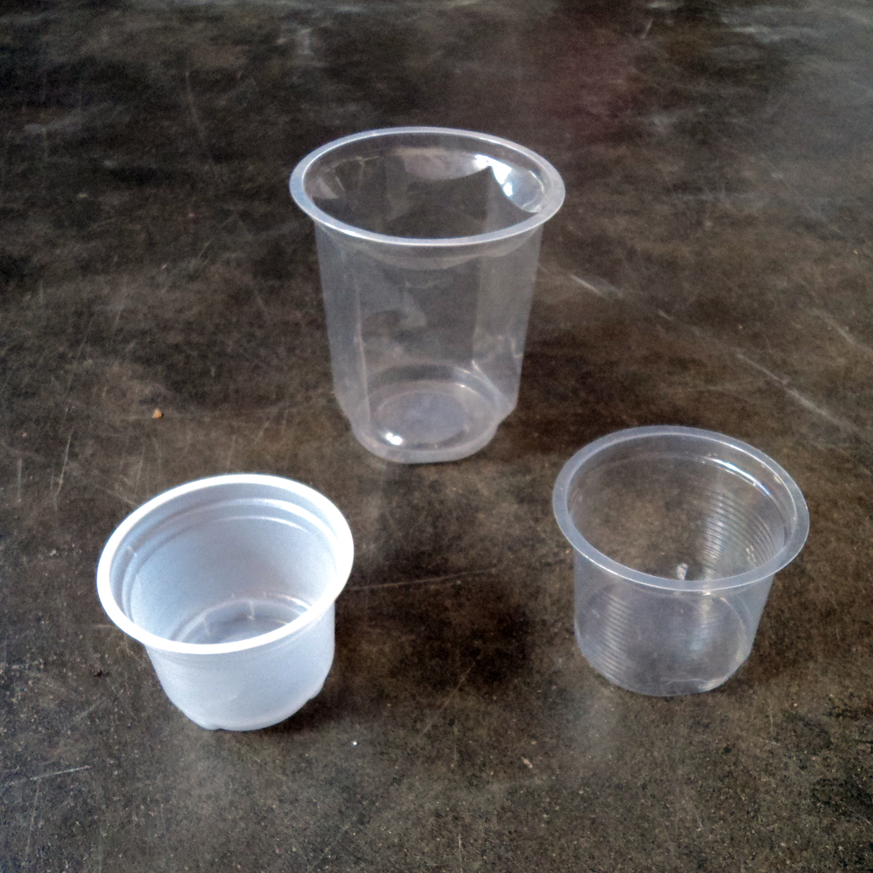 பயன்படுத்திய பிறகு குப்பைத்தொட்டியில் போடப்படும் தேநீர் குவளைகள்